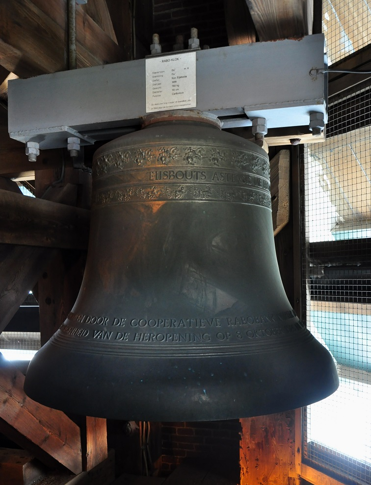 De Raboklok in de toren van Nijkerk